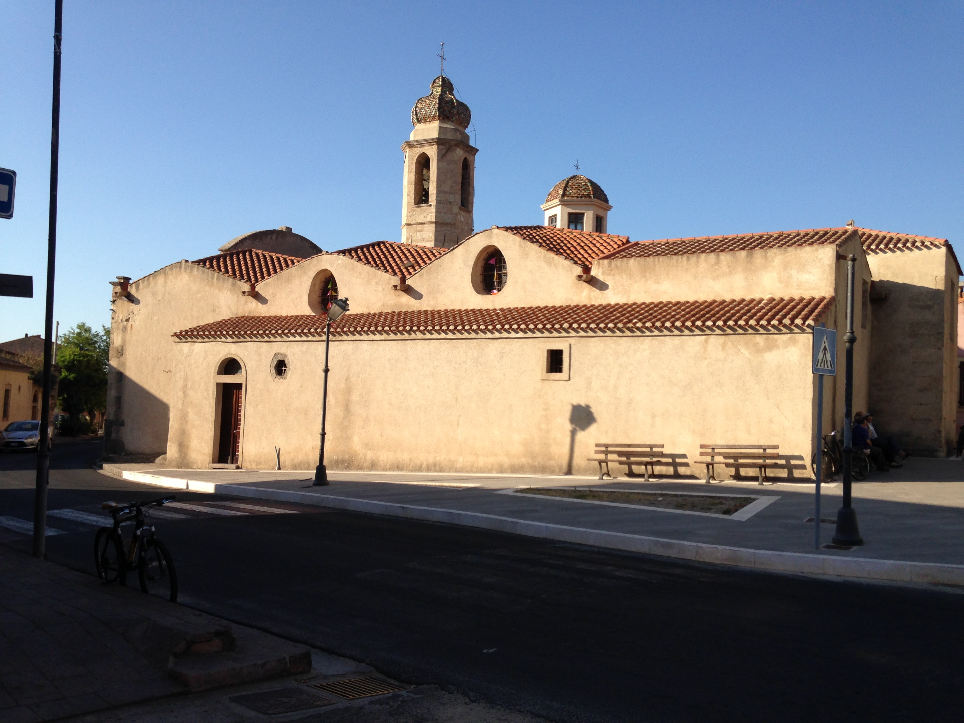 La chiesa parrocchiale di San Martino, al centro del paese